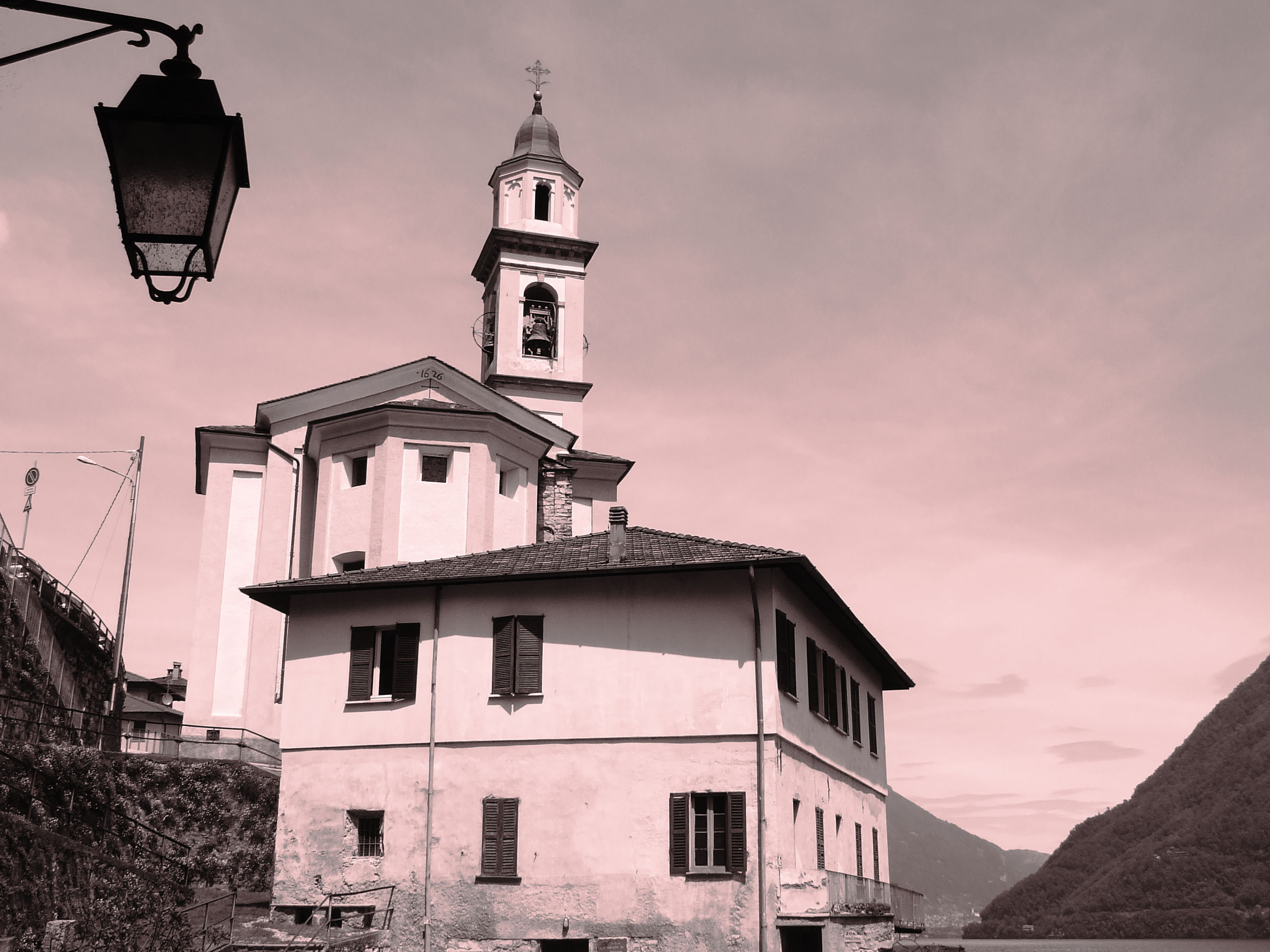 Brienno, Lago di Como (Italy). Chiesa Parrocchiale.